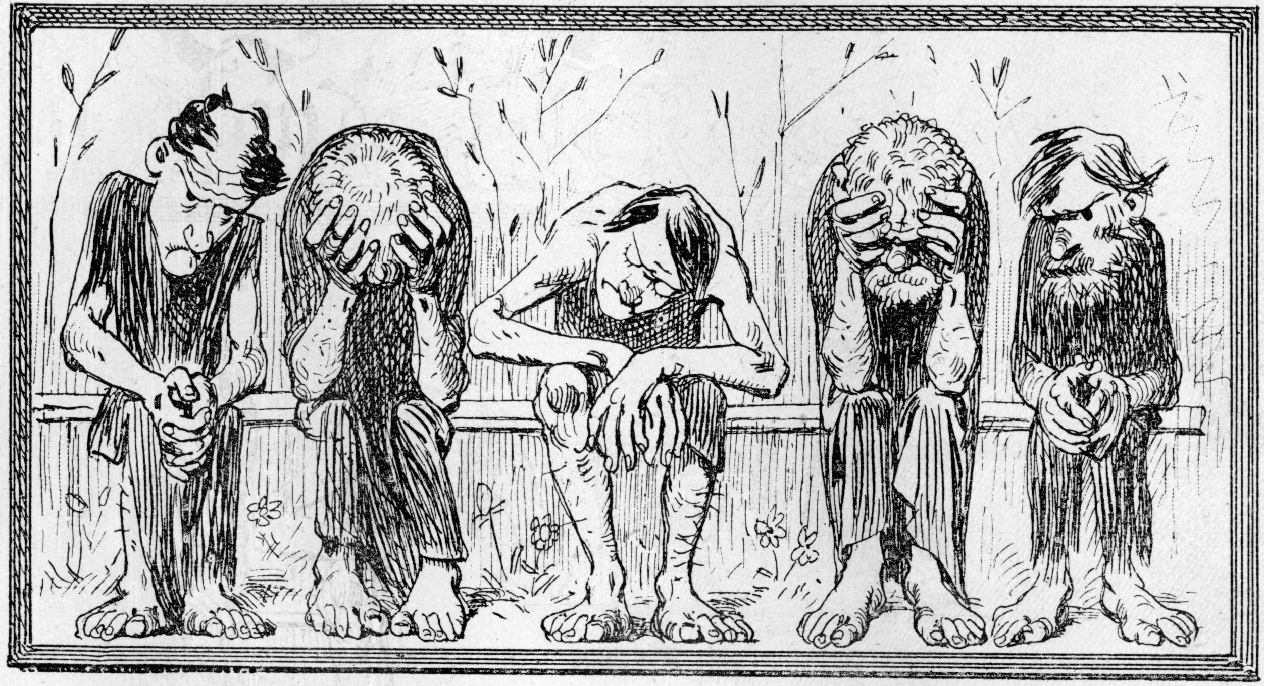 Les âmes déçues" de Ferdinand Hodler au Salon des Rose-Croix de 1892